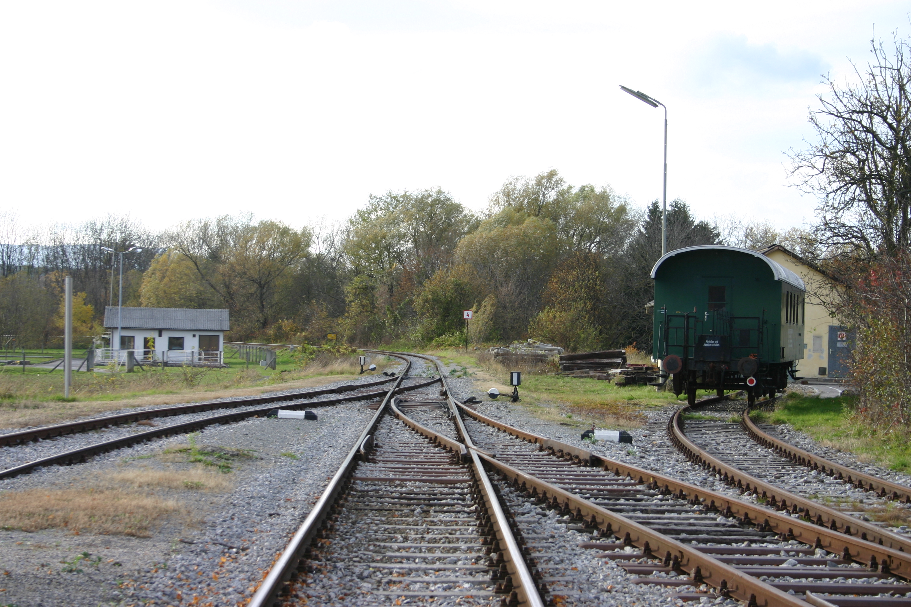 Lackenbach, Bahnhof der Burgenlandbahn – Blick Richtung Oberloisdorf, hier zweigte früher auch die Anschlussbahn zum Sägewerk Esterhazy ab